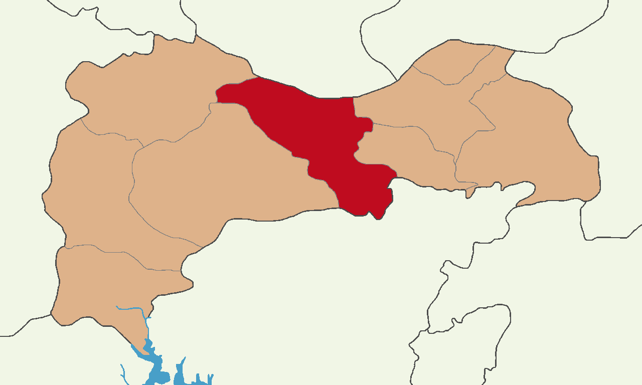 Erzincan Merkez ilçesinin konumu